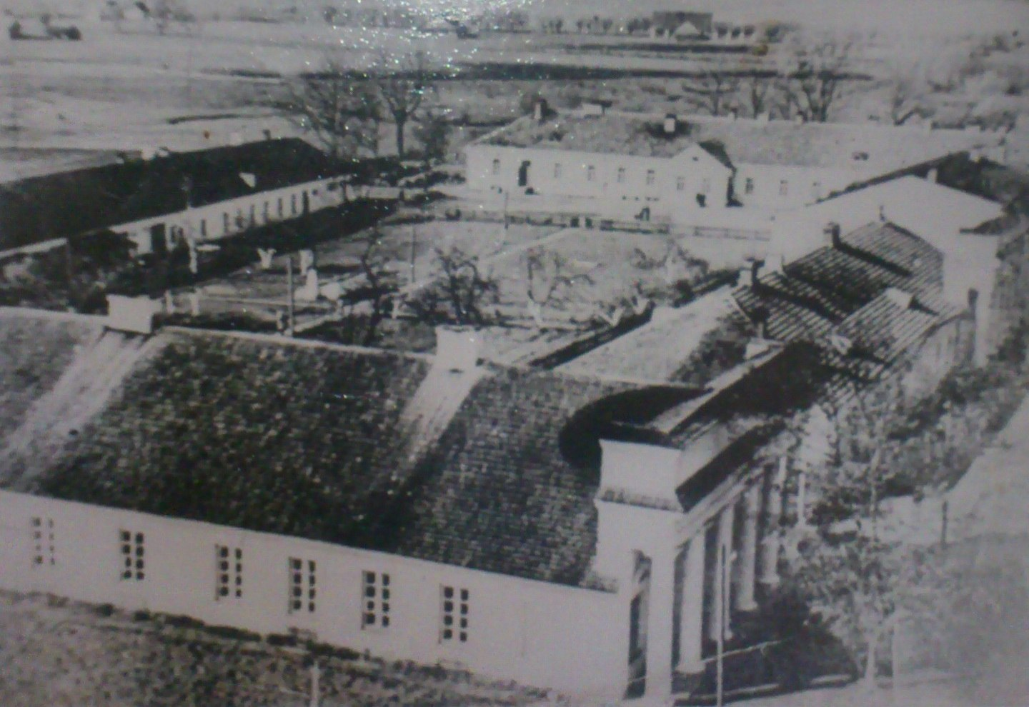 Беларуская (тарашкевіца): Сьвіслач (Śvisłač), пляц Гімназічны (plac Gimnazičny) або Рынак (plac Rynak). Сьвіслацкая гімназія